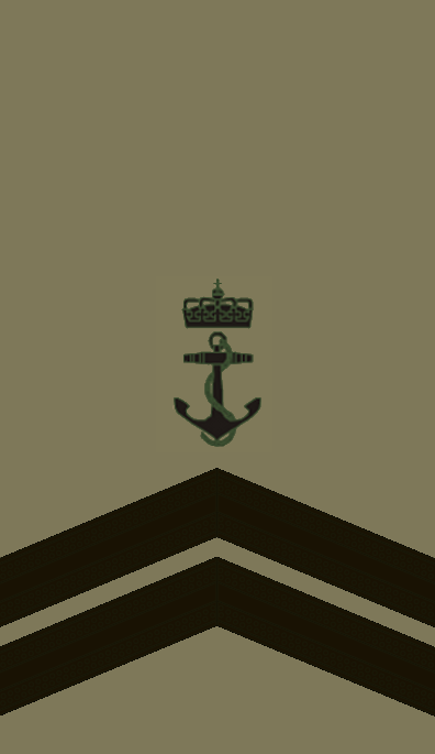 OR6 NOR - Skvadronmester